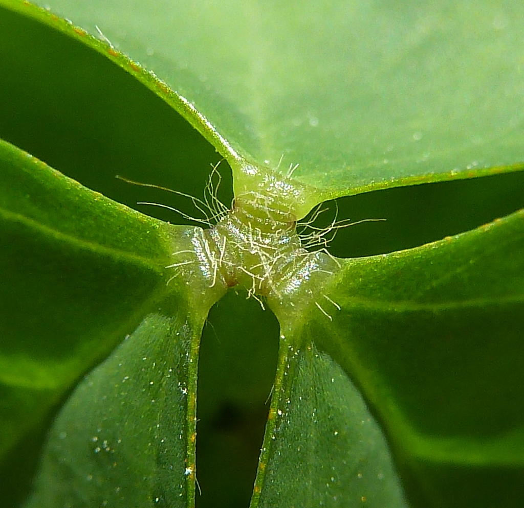 Oxalis debilis var. corymbosa (Agricos) : Detalle de la articulación de los folíolos de las hojas, mediante anillos móviles - Ornamental, Albatera (Alicante, España).